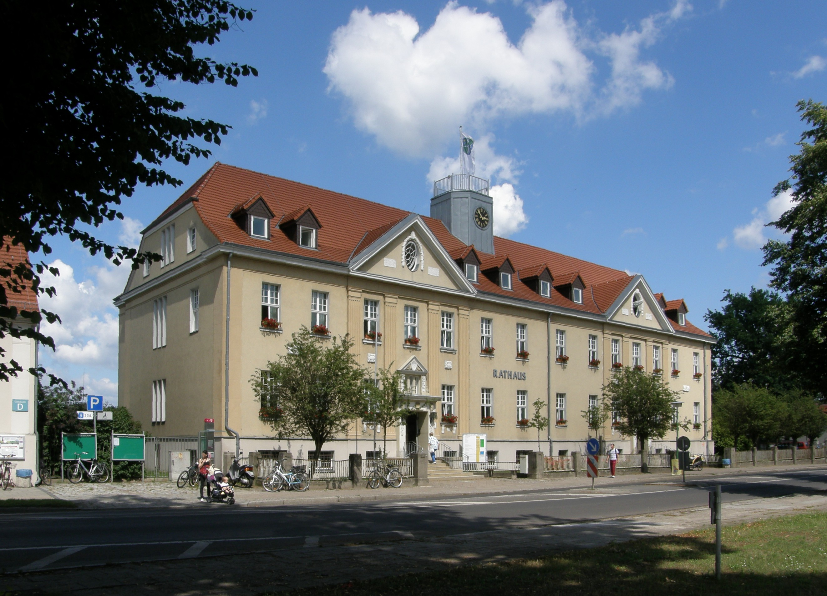 Falkensee, Falkenhagener Straße, Rathaus; Baudenkmal